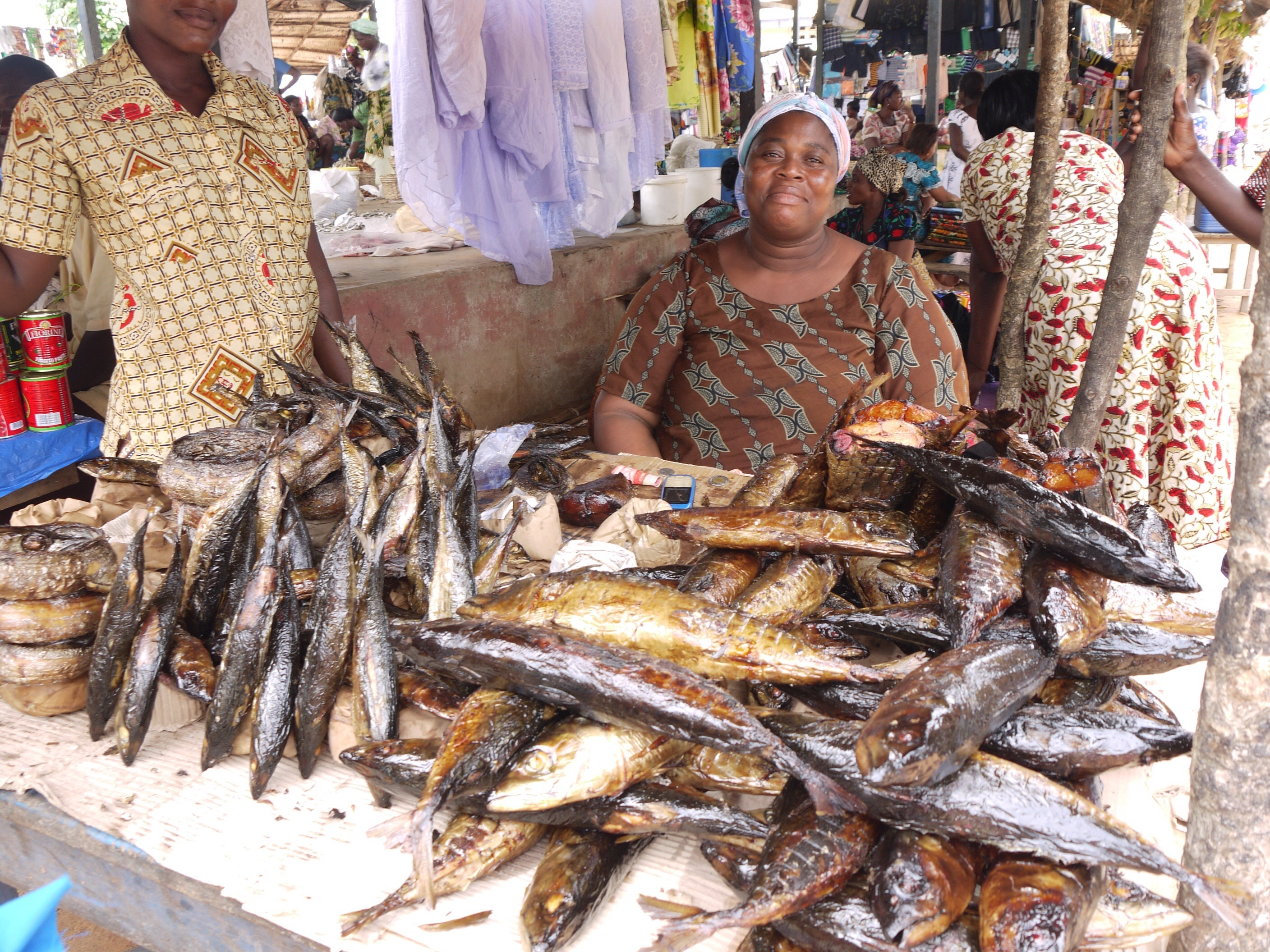 Fish seller in market, Ghana